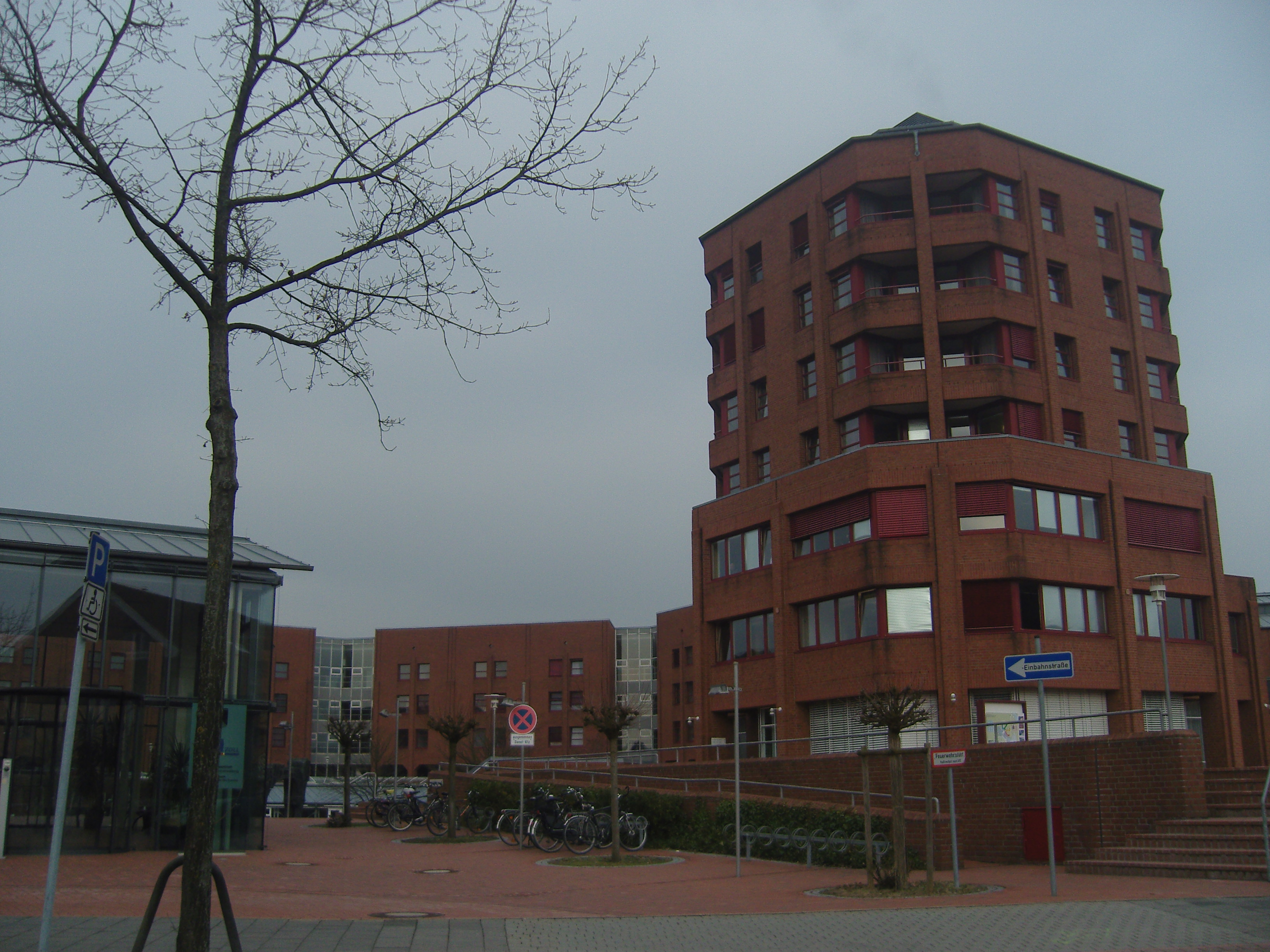 Bildungs- und Wissenschaftszentrum der Bundesfinanzverwaltung (Verwaltungsturm im Vordergrund, im Hintergrund - Wohnbereich)